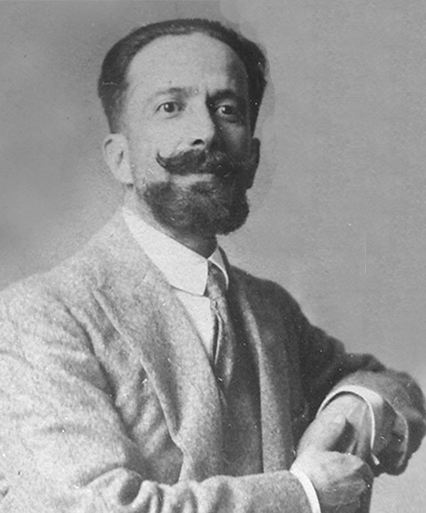 Aldo di Crollalanza, terzo direttore dell'Annuario della Nobiltà Italiana nel 1905